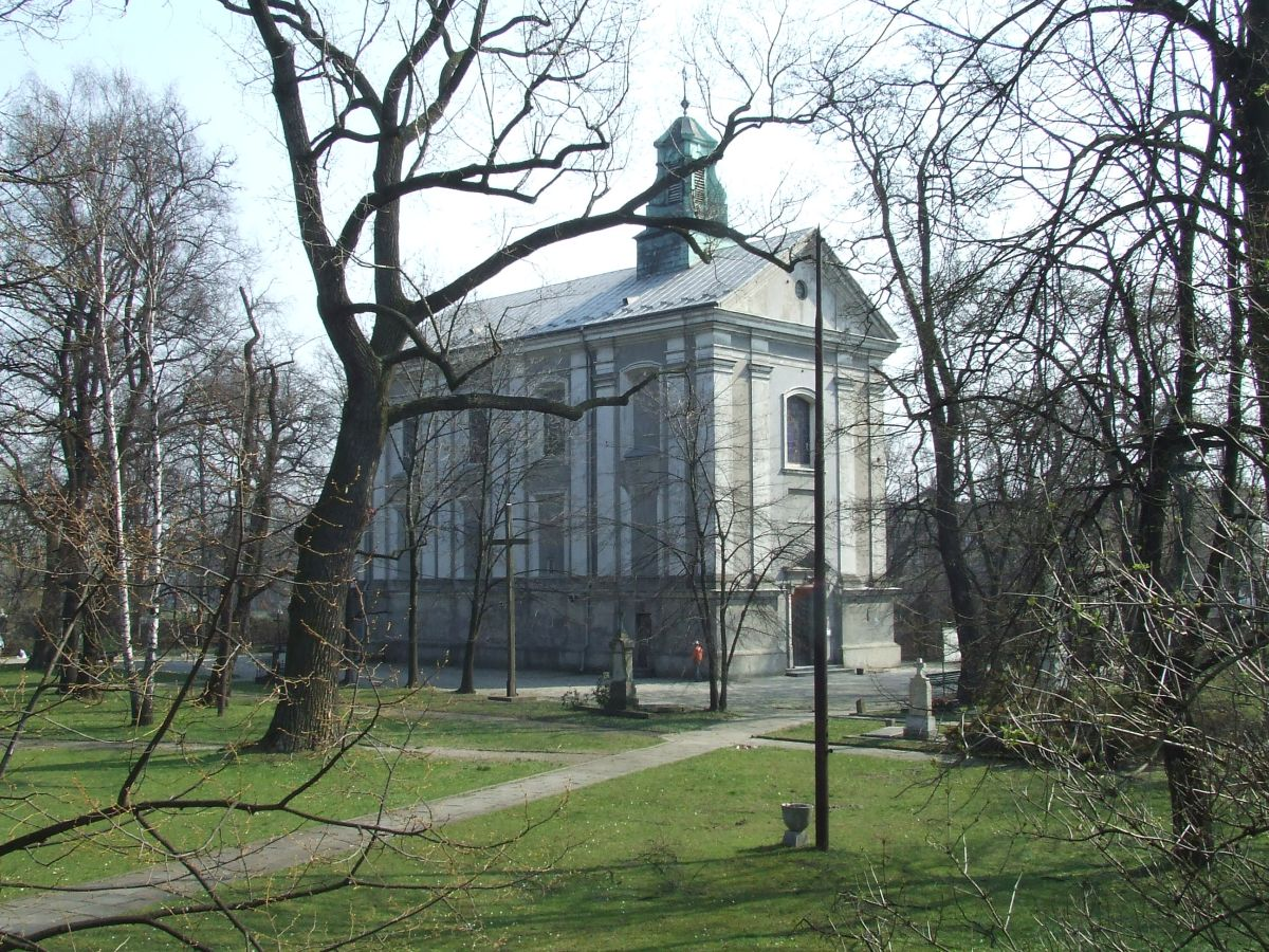 Kościół św. Wawrzyńca w Warszawie, Warszawa, Poland